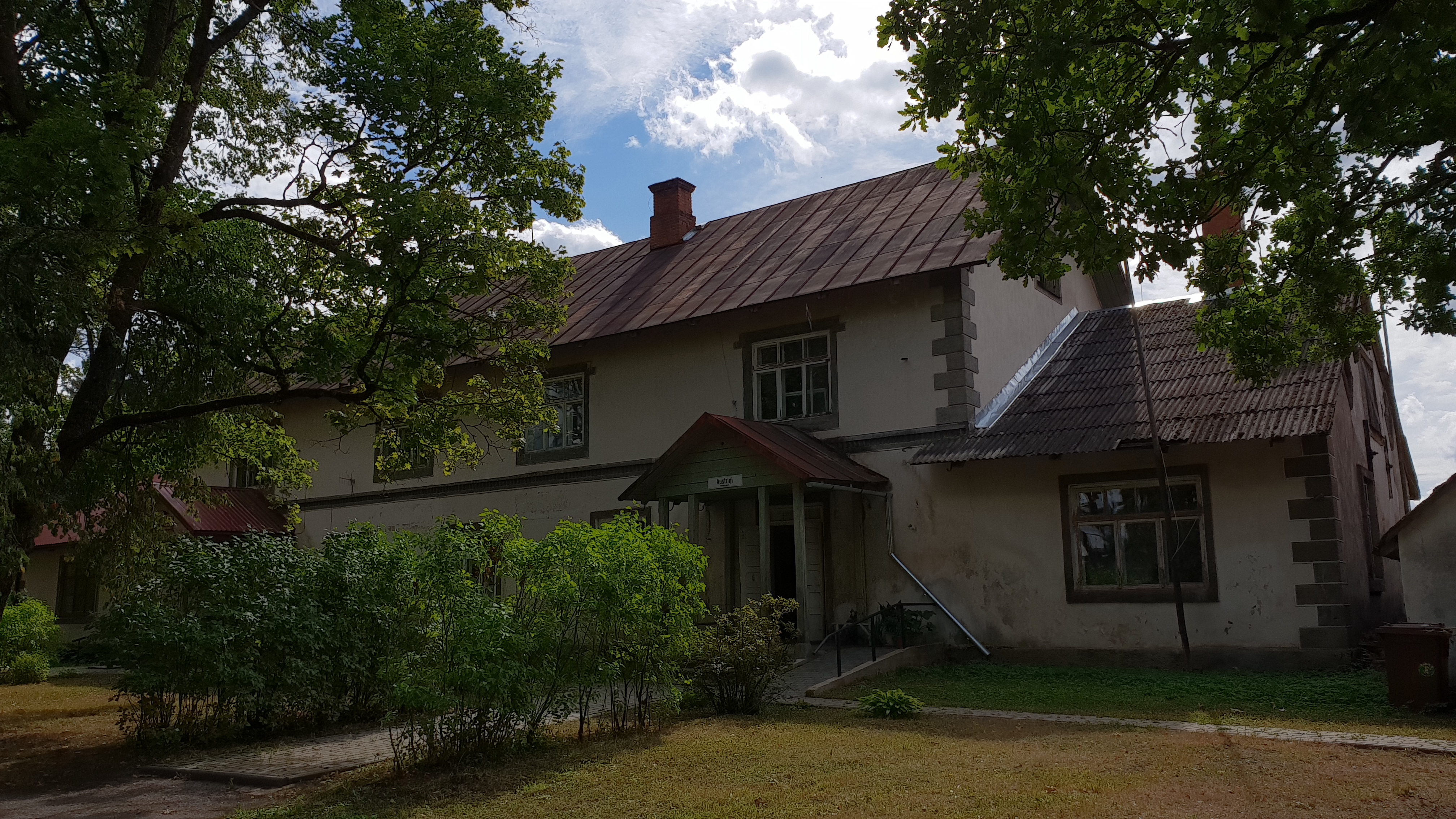 Mālupe mõisa peahoone 2018. aastal